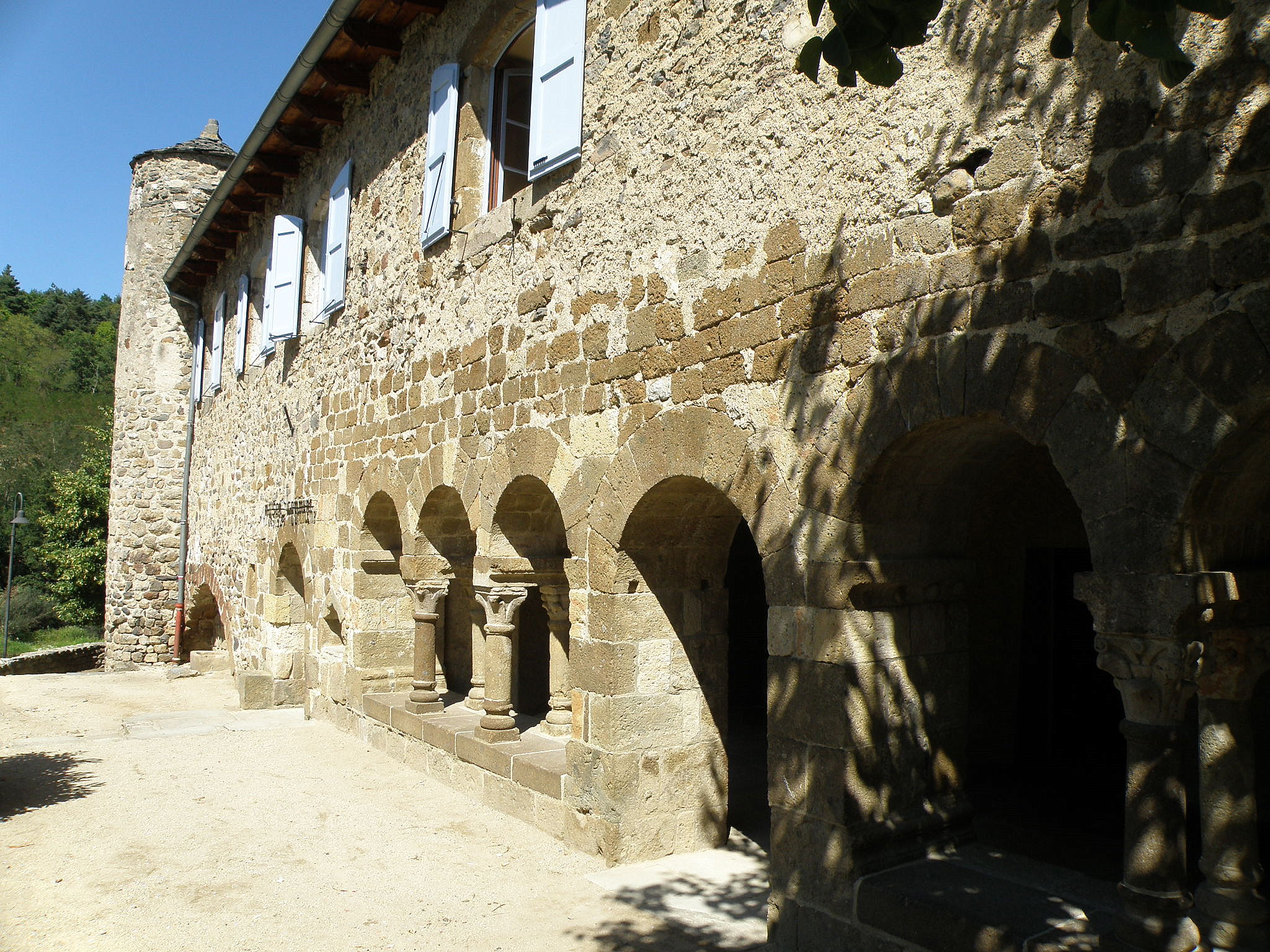 Chamalières-sur-Loire, comm. dans le départ. de la Haute-Loire, France (région Auvergne). Cloître de l'ancien prieuré, attenant à l'église Saint-Gilles.